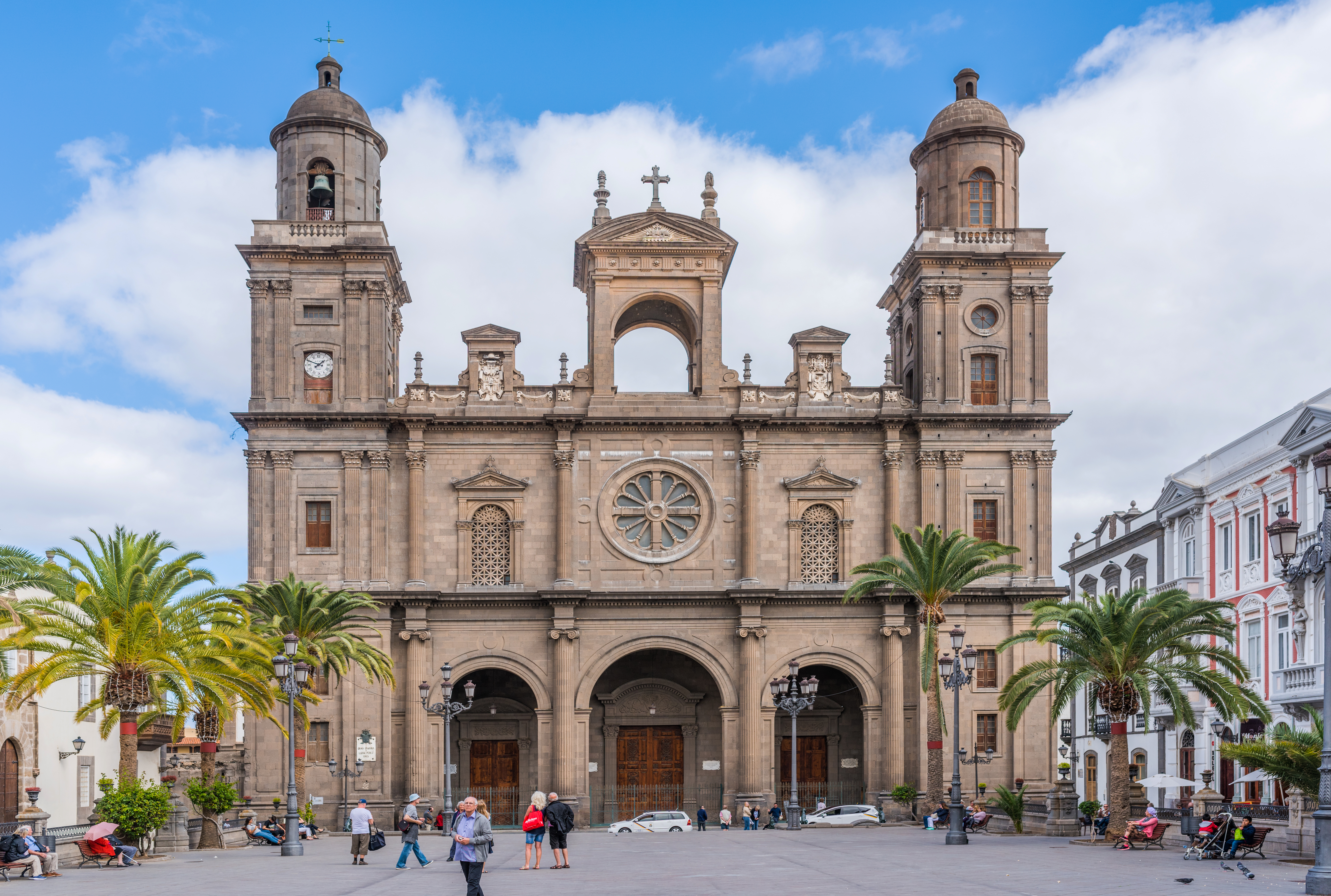 Catedral de Santa Ana, Las Palmas, Gran Canaria, January 2018